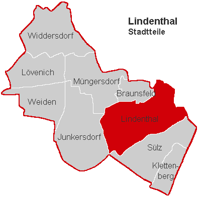 Lagekarte Lindenthal im Stadtbezirk Köln-Lindenthal